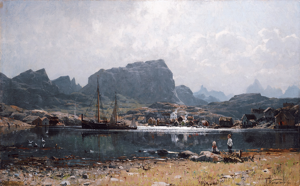 Fiskevær i Nord-Norgelabel QS:Lde,"Fischerdorf in Nordnorwegen"label QS:Len,"Fiskevær i Nord-Norge"